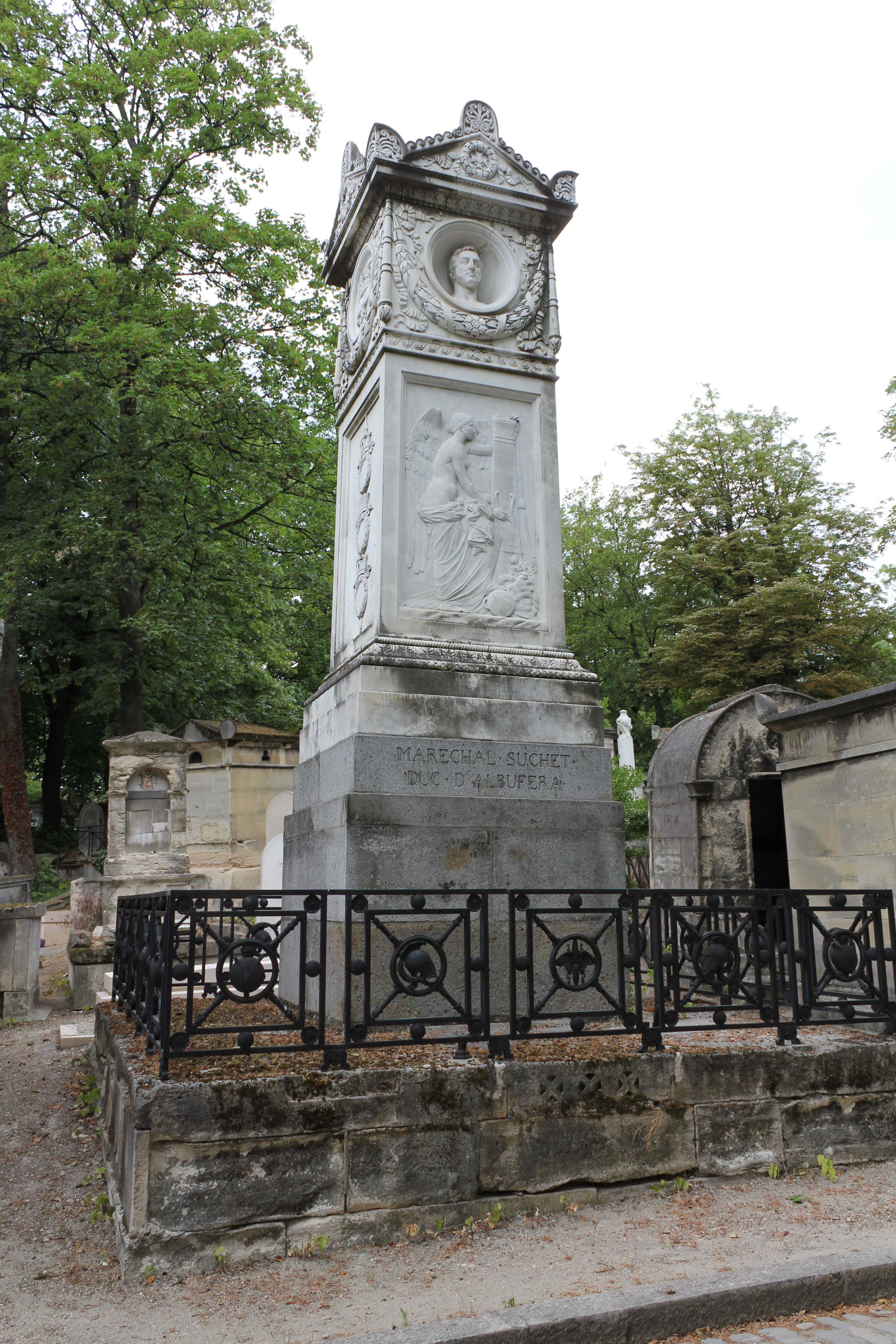 Tombe ornée d'un bas-reliefs signé P. J. David d'Angers 1828 et d'un buste en marbre signé P. J. David d'Angers 1827 sur la face antérieure, et d'un relief signé Plantar sur la face postérieure.